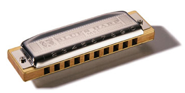 Bluesharp von Hohner